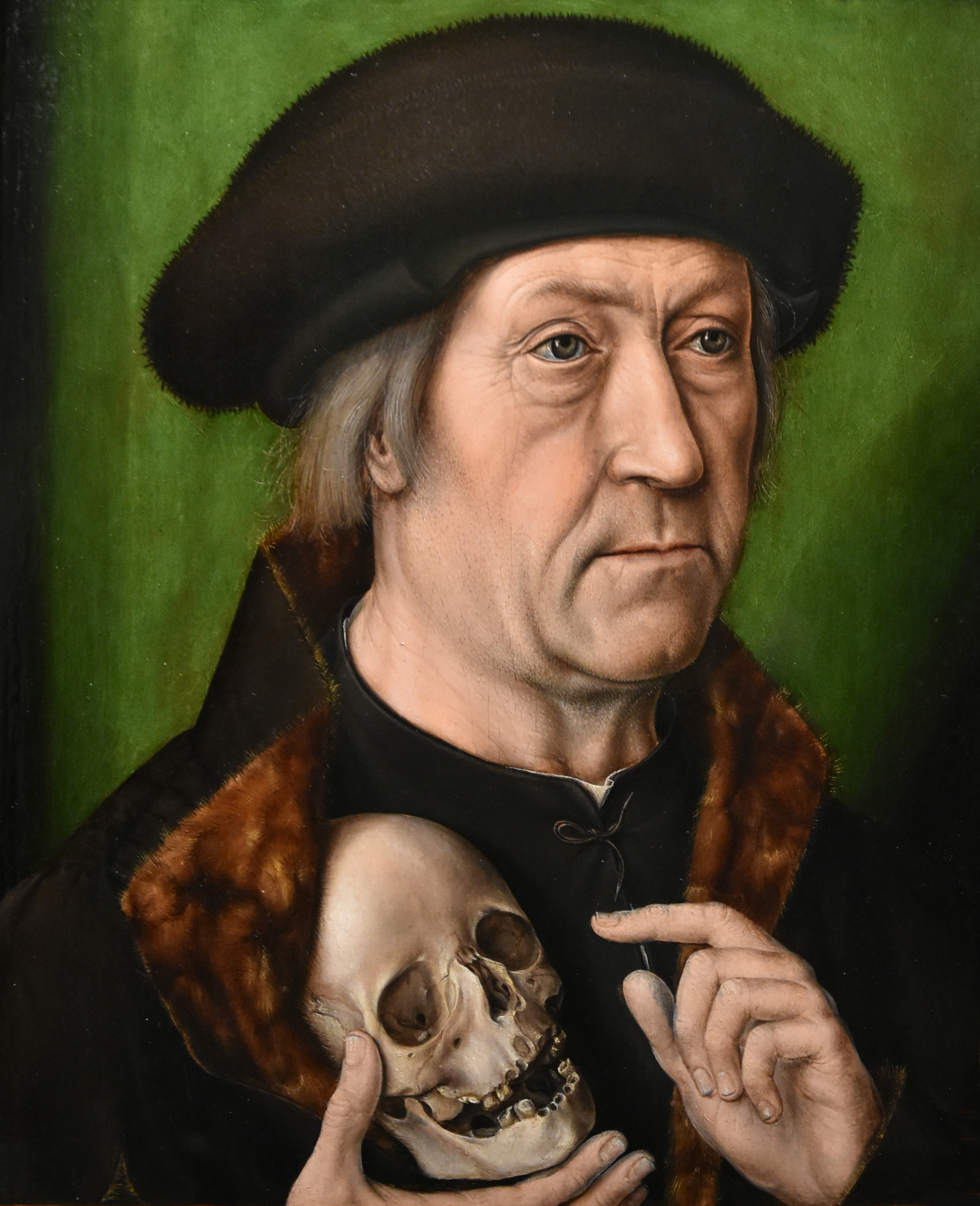 Albrecht Bouts (ca.1452-60 - 1549) Zelfportret met een doodshoofd - Noordbrabants Museum 's-Hertogenbosch